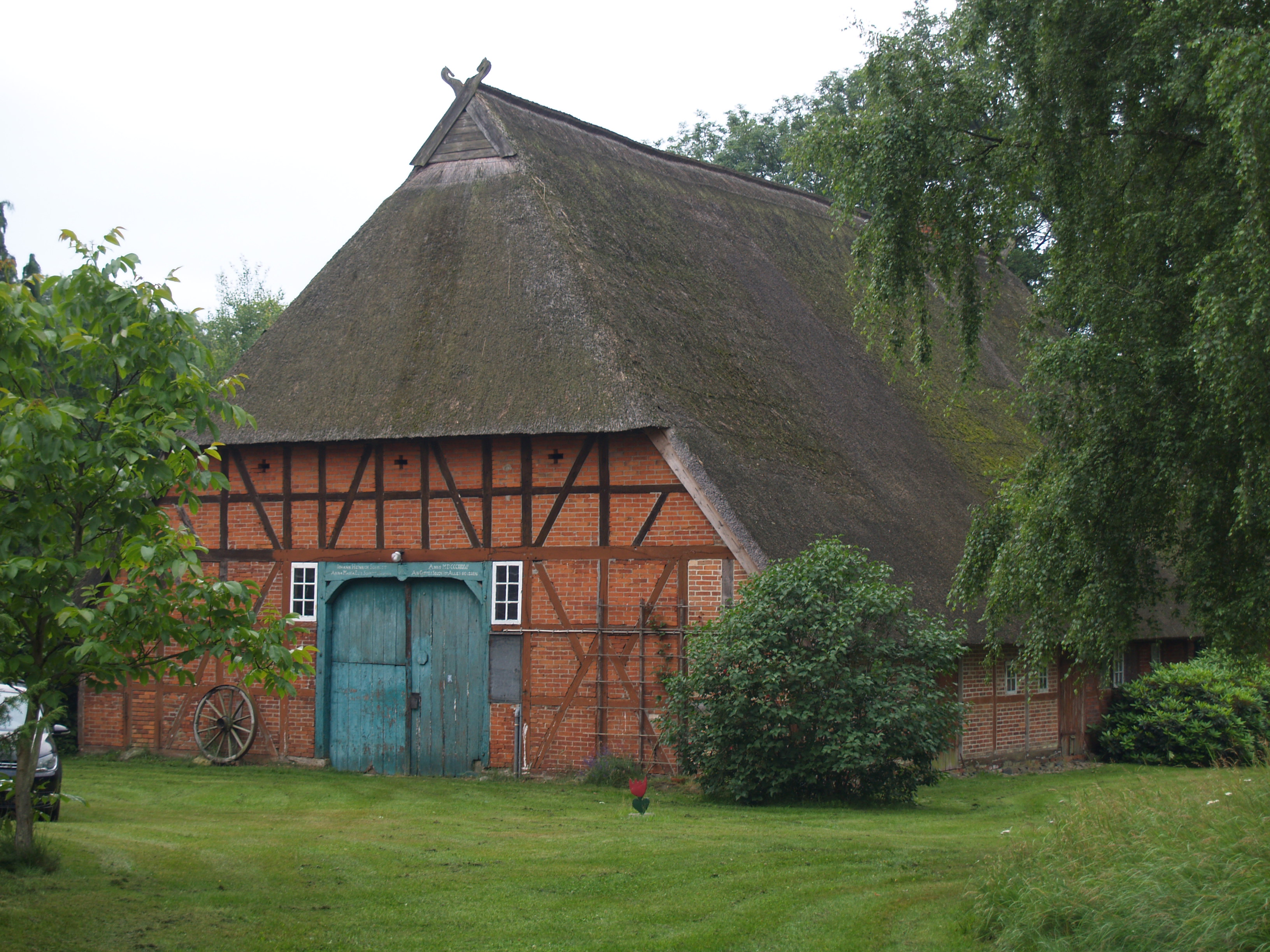 Fachhallenhaus in Göttin, Kreis Herzogtum Lauenburg, Deutschland